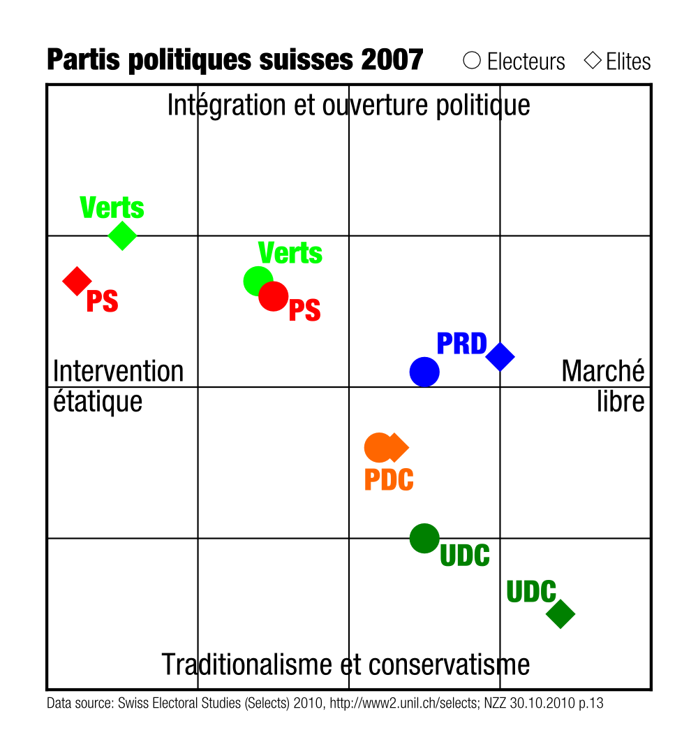 Les positions politiques des électeurs et élites des grands partis suisses (2007). Les données sont prises de la recherche de Philipp Leimgruber (University of Bern), Dominik Hangartner (Washington University) et Lucas Leemann (Columbia University), au cadre des Swiss Electoral Studies (Selects) de l'Université de Lausanne, et publiés en Comparing Candidates and Citizens in the Ideological Space, Swiss Political Science Review 16(3) pp. 499-531(33). La présentation graphique se calque sur celle de la Neue Zürcher Zeitung du 30 Octobre 2010, p. 13.